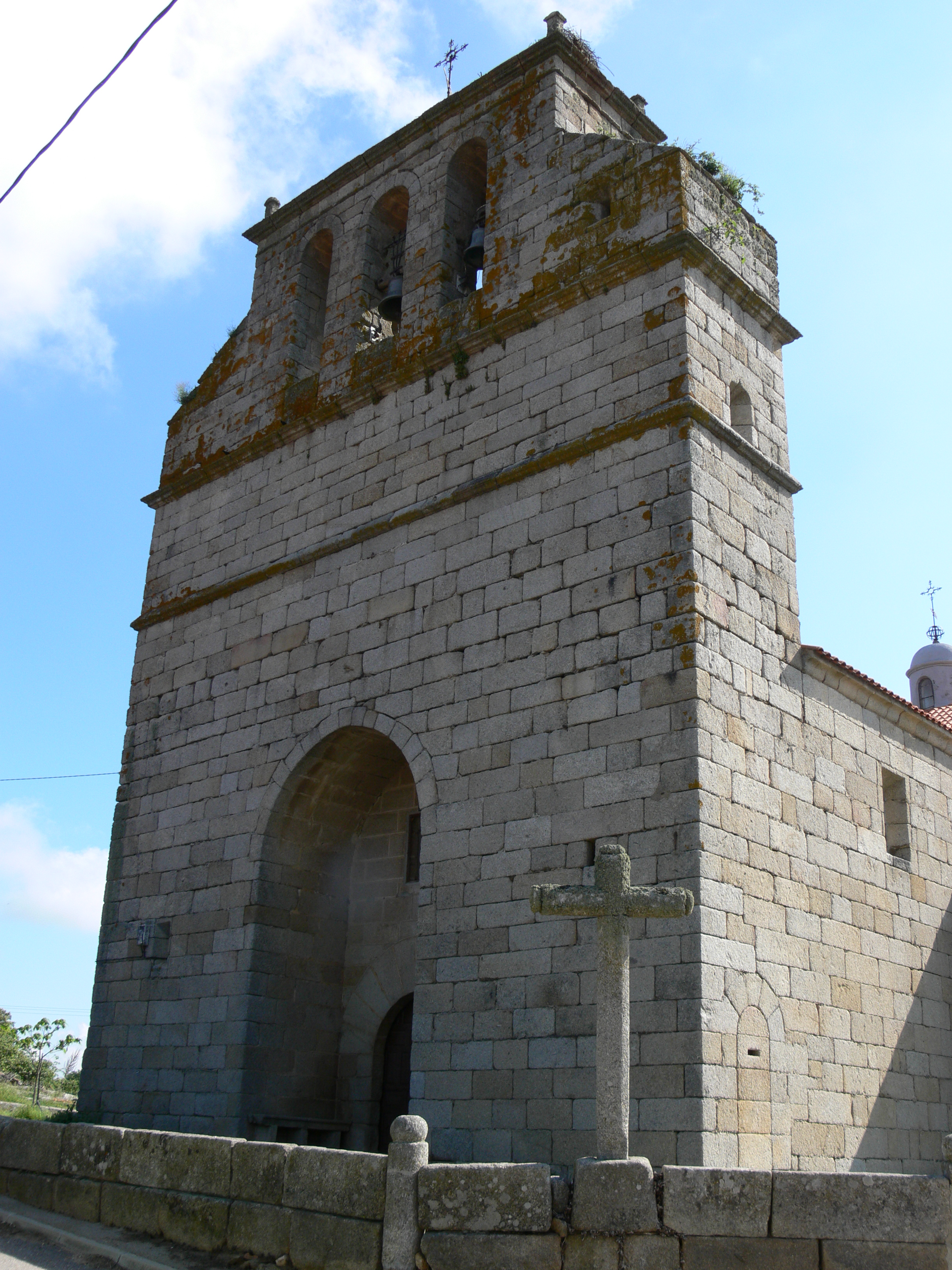 Bogajo